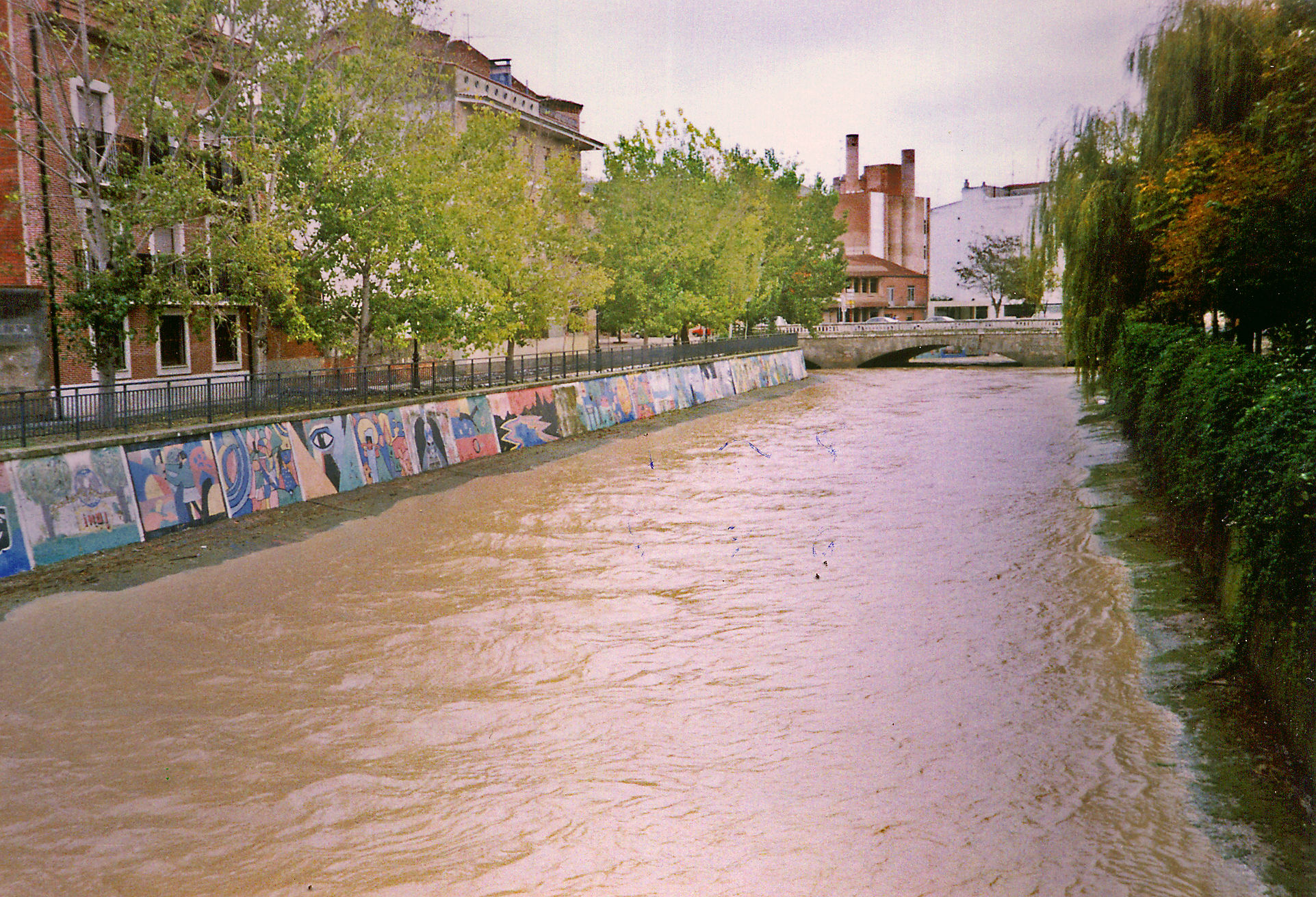 Una crecida del río Zapardiel, a su paso por Medina del Campo (Valladolid) en diciembre de 1997